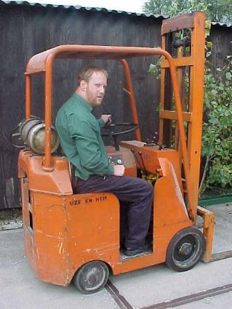 Towmotor® Forklift Model LT-35 (1950) gebouwd in Denemarken. Verkozen tot 'Vorkheftruck van de 20e eeuw'. Huidige eigenaar: Willem van Dijk, Arnhem, Nederland.